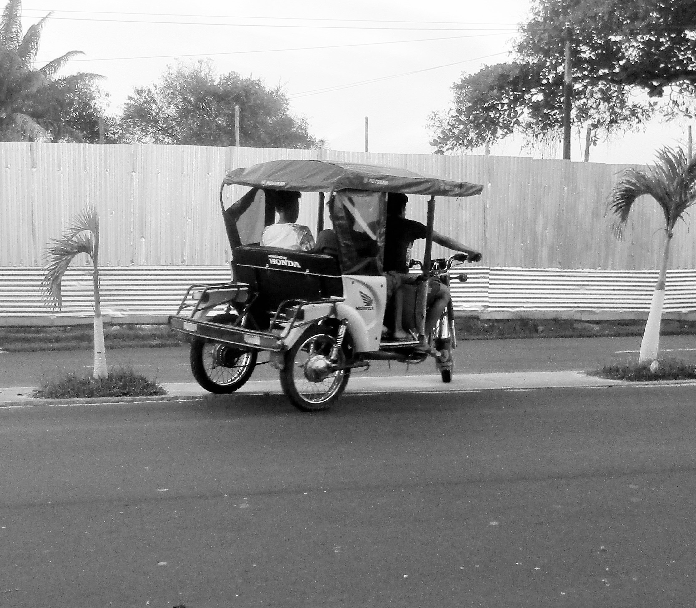 Imprudencia o Negligencia al romper las reglas de transito